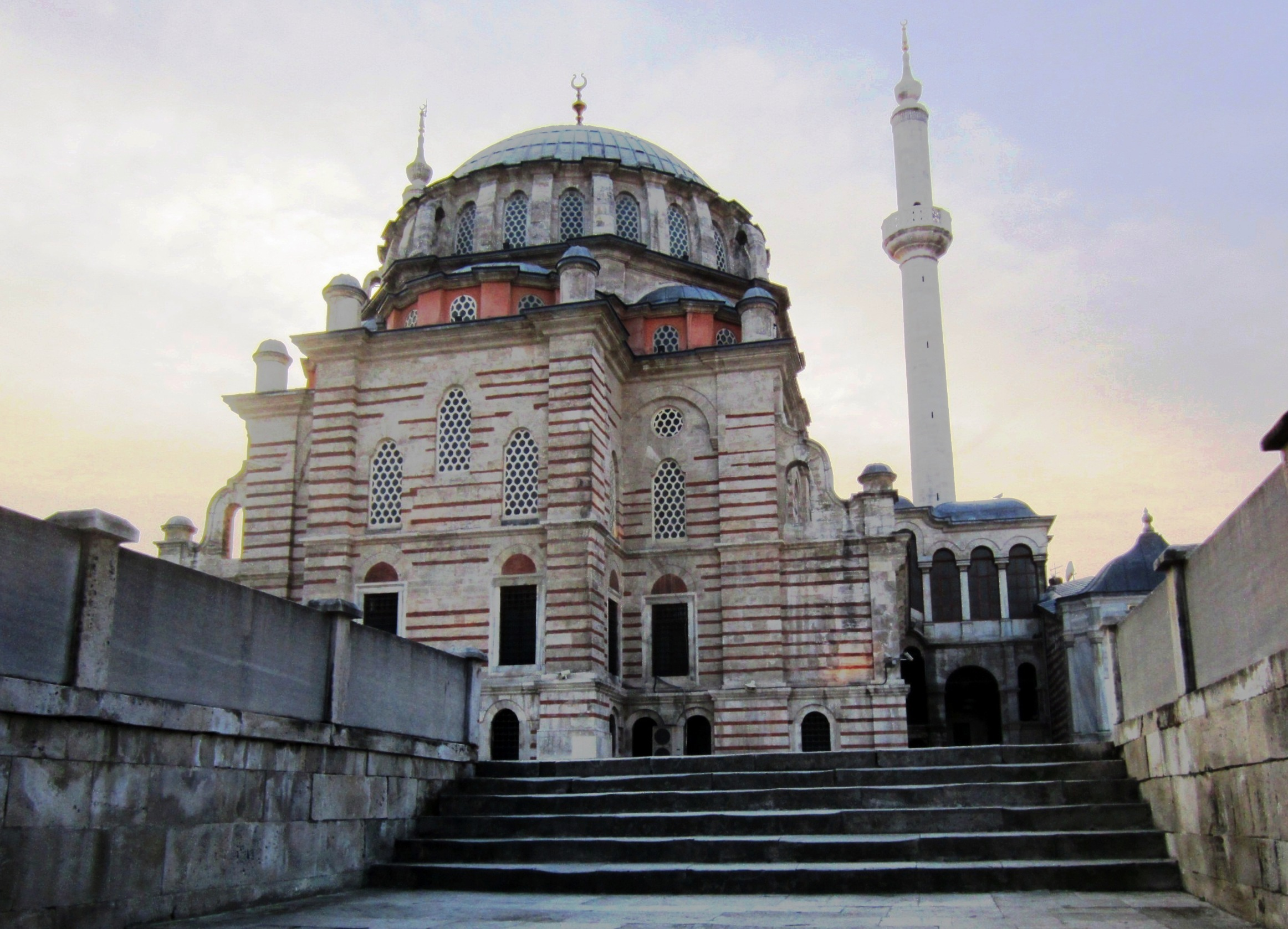 Laleli Camii (Tulpenmoschee), Istanbul